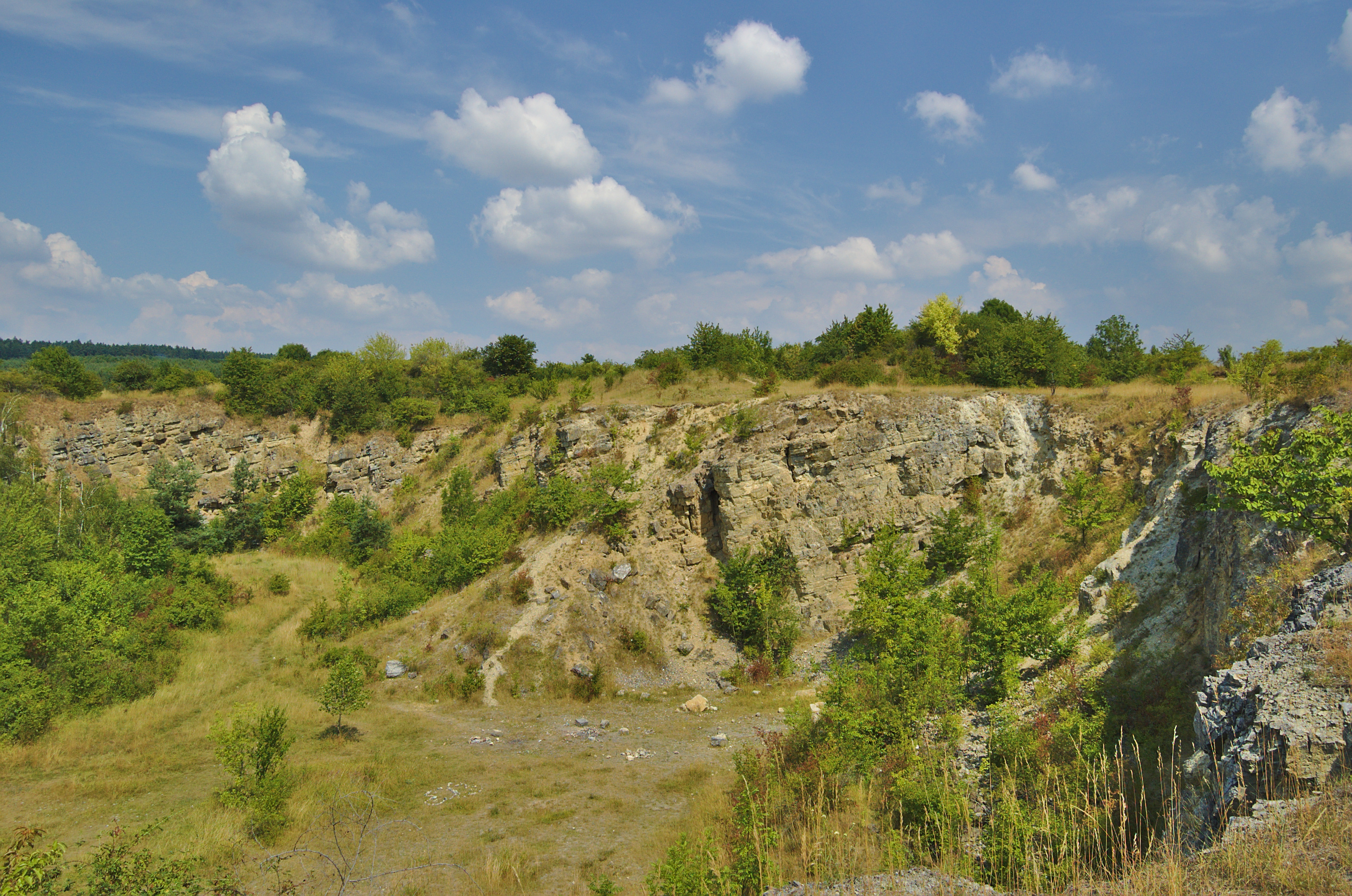 Národní přírodní památka Státní lom, Čelechovice na Hané, okres Prostějov